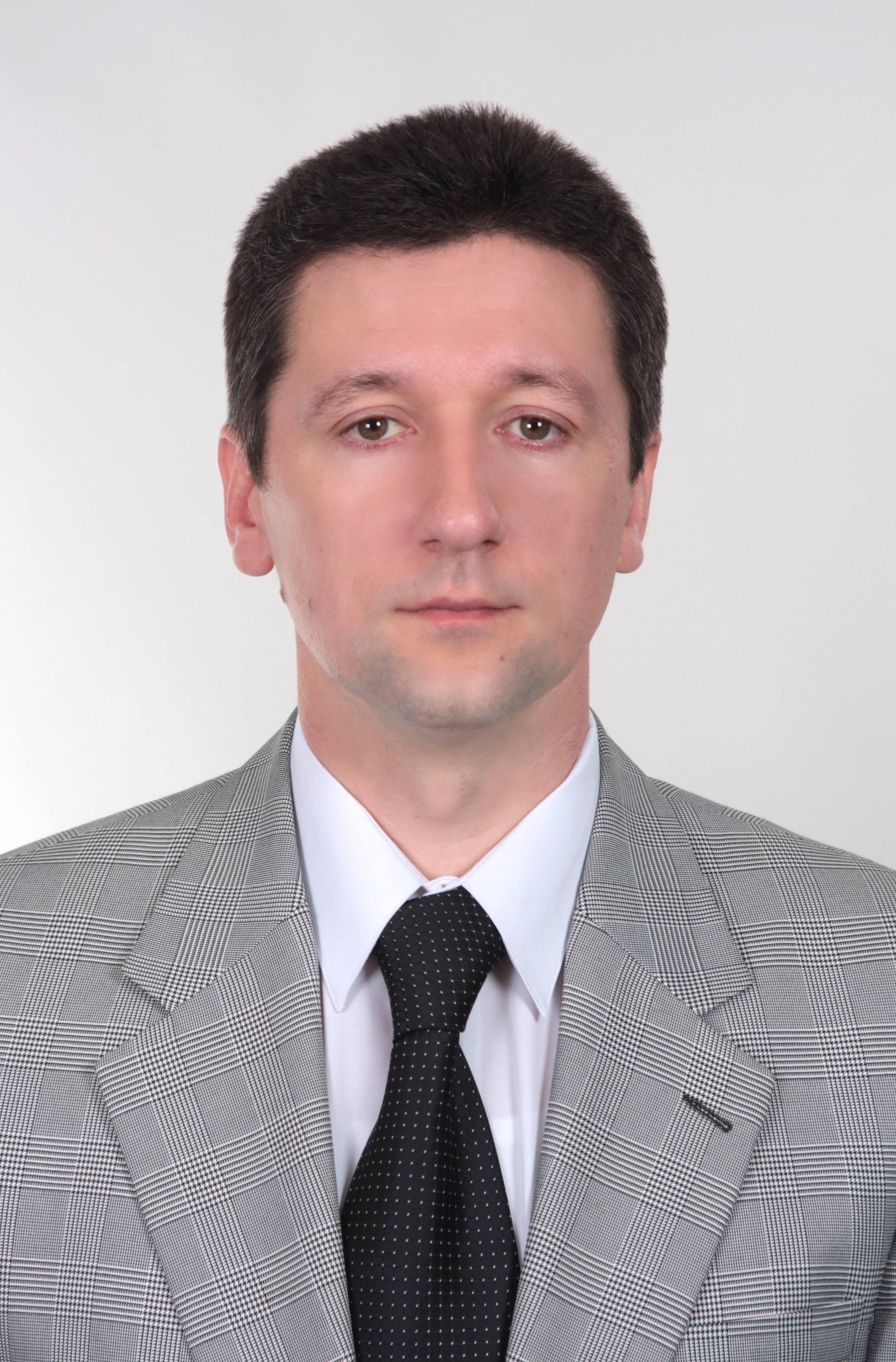 Фото Стеценка С.Г. — український учений-правознавець. Доктор юридичних наук (2002 р.), професор (2005 р.), заслужений діяч науки і техніки України (2010 р.), член-кореспондент Національної академії правових наук України (2013 р.).